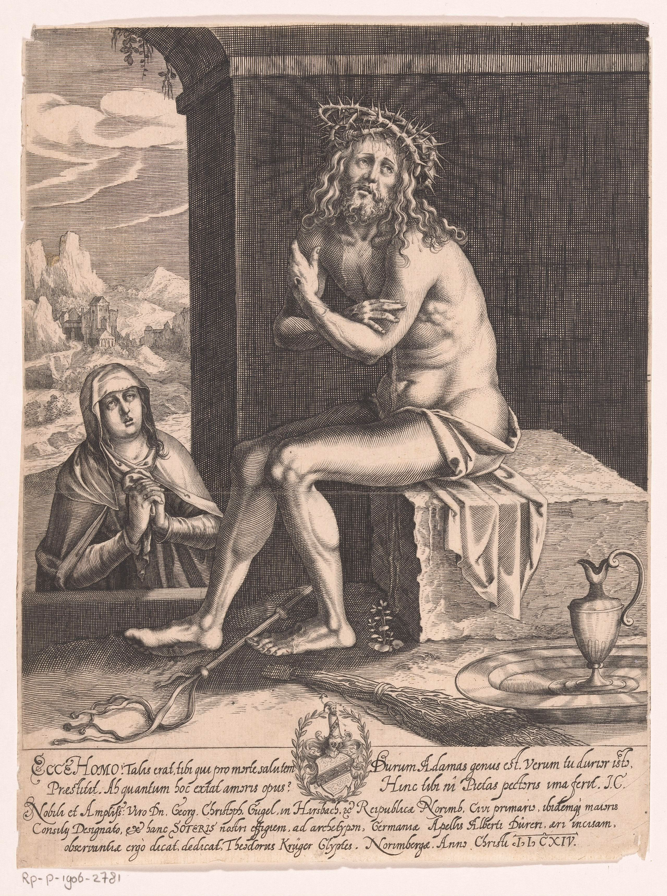 IdentificatieTitel(s): Christus als Man van Smarten, vergezeld door MariaEcce Homo (titel op object)Objecttype: prent Objectnummer: RP-P-1906-2781Catalogusreferentie: Hollstein German 8Opschriften / Merken: verzamelaarsmerk, verso, gestempeld: Lugt 2228Omschrijving: Met het wapenschild van de Duitse familie Gugel.VervaardigingVervaardiger: prentmaker: Dietrich Krüger (vermeld op object)naar ontwerp van: Albrecht Dürer (vermeld op object)opgedragen door: Dietrich Krüger (vermeld op object)opgedragen aan: Georg Christoph Gugel (vermeld op object)Plaats vervaardiging: prentmaker: Neurenbergopgedragen aan: HirschbachDatering: 1614Materiaal: papier Techniek: graveren (drukprocedé)Afmetingen: blad: h 255 mm (binnen plaatrand afgesneden) × b 193 mm (binnen plaatrand afgesneden)OnderwerpWat: Man of Sorrows together with otherssingle instruments of the PassionVerwerving en rechtenVerwerving: aankoop 1906Copyright: Publiek domein